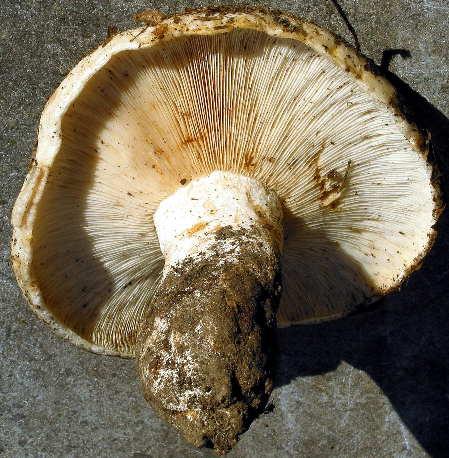 Lactarius vellereus (Belgique/Belgium), Saint-Symphorien (Belgique), bois clair de feuillus (peupliers et saules)/light wood (poplars and willows).